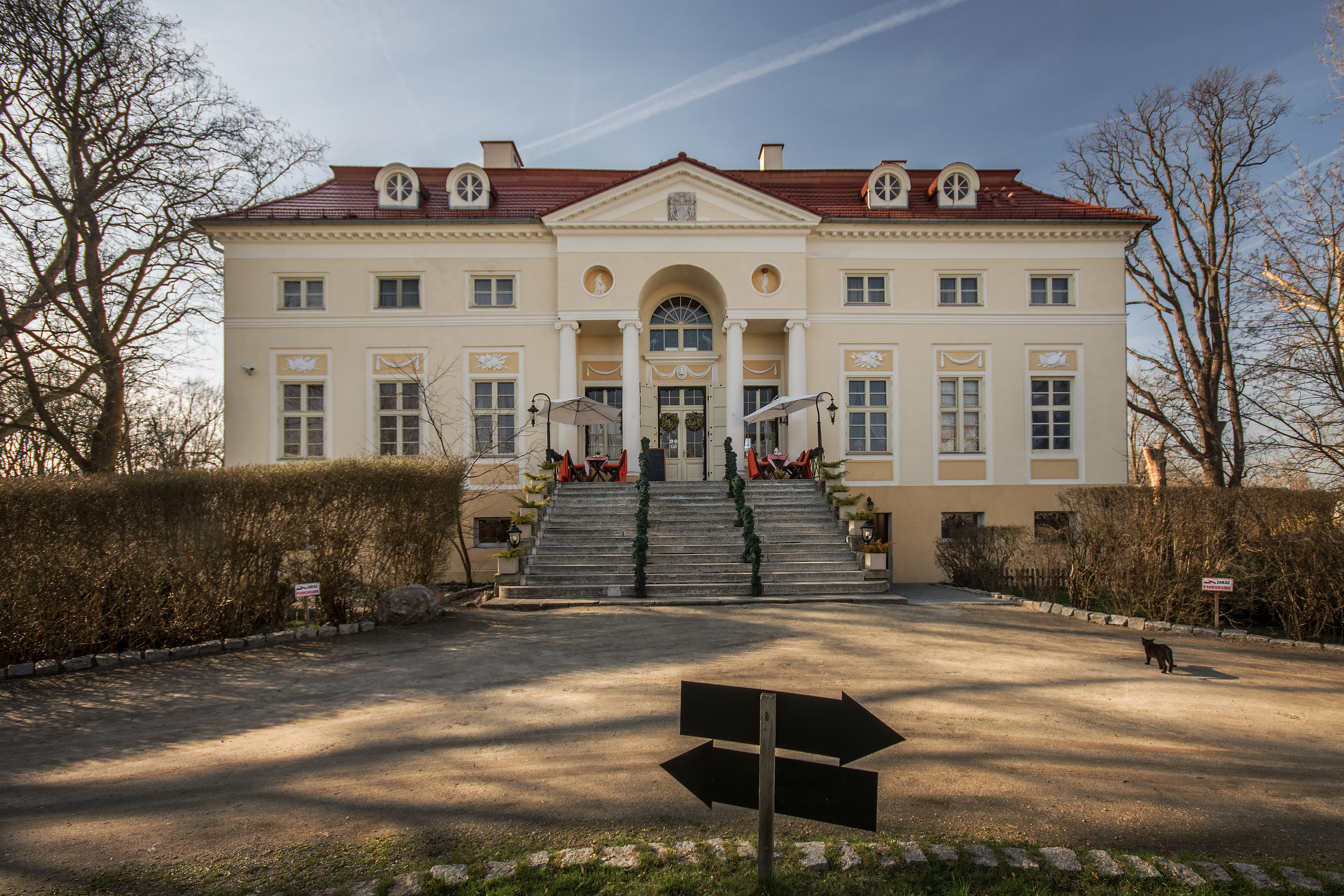 Samotwór, pałac, 1776-1781